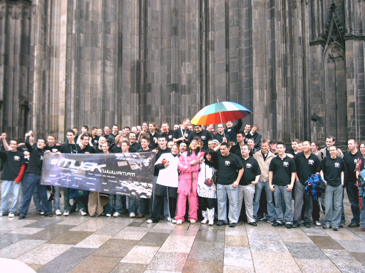 Das RauteMusik Team am 16.04.2005 in Köln